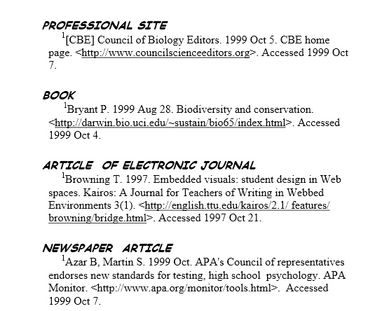 contoh penyitiran bahan pustaka